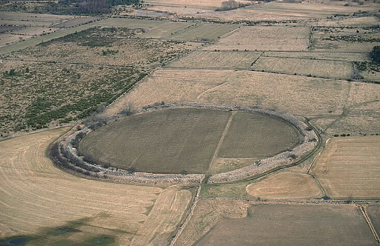 Motiv: Trindborgen Nyckelord: Flygbilder, Riksintressen Kategori: Fornborg .